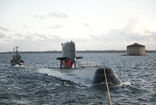 HMS Neptun under bogsering till Kockums Karlskrona för översyn.